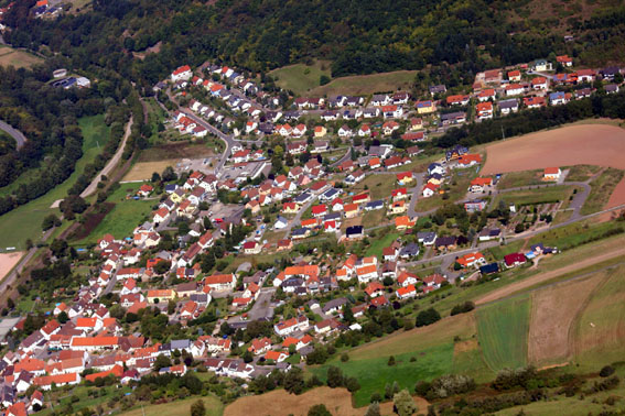 Luftaufnahme von Bedesbach.